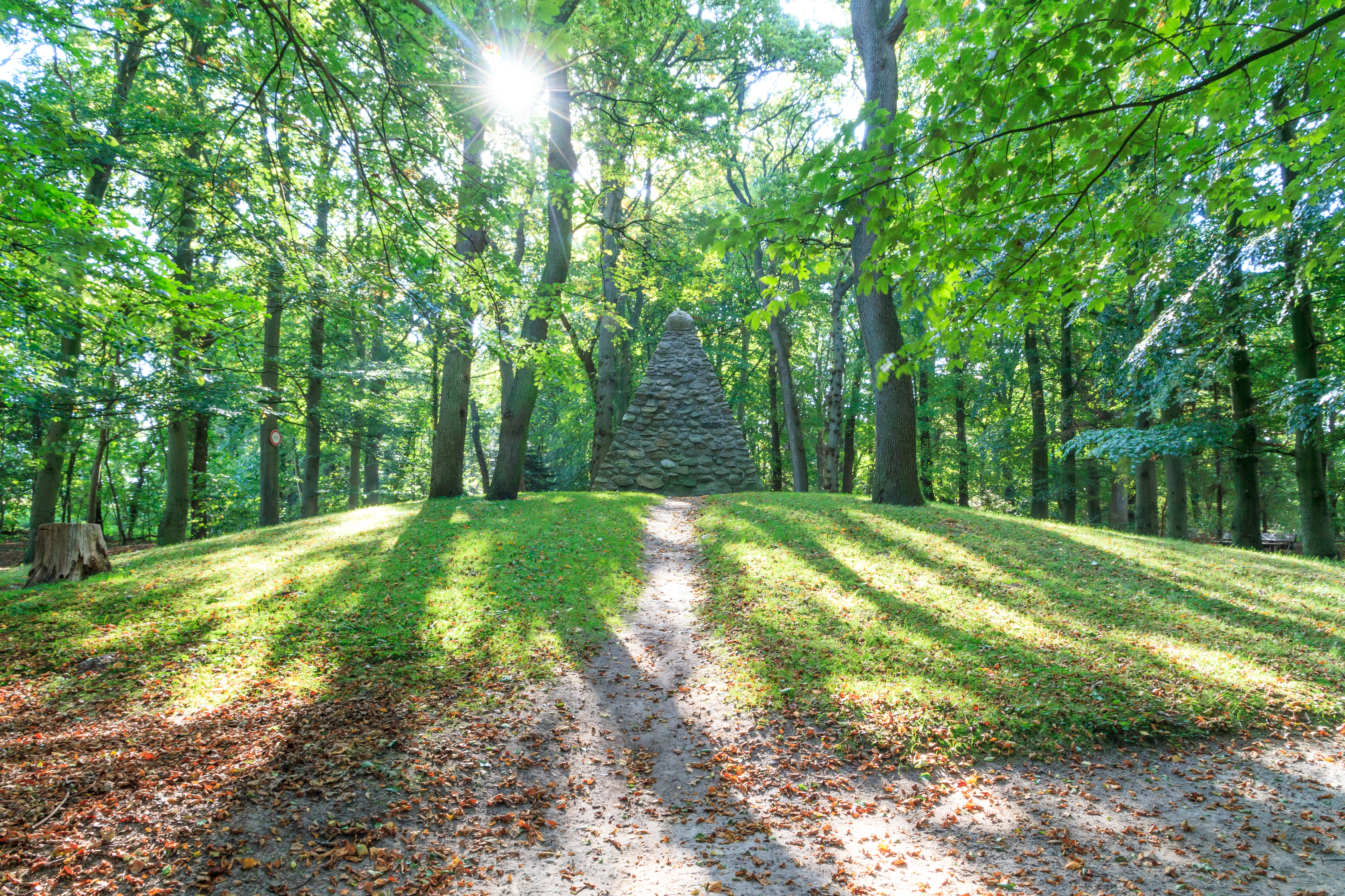 Upstalsboom